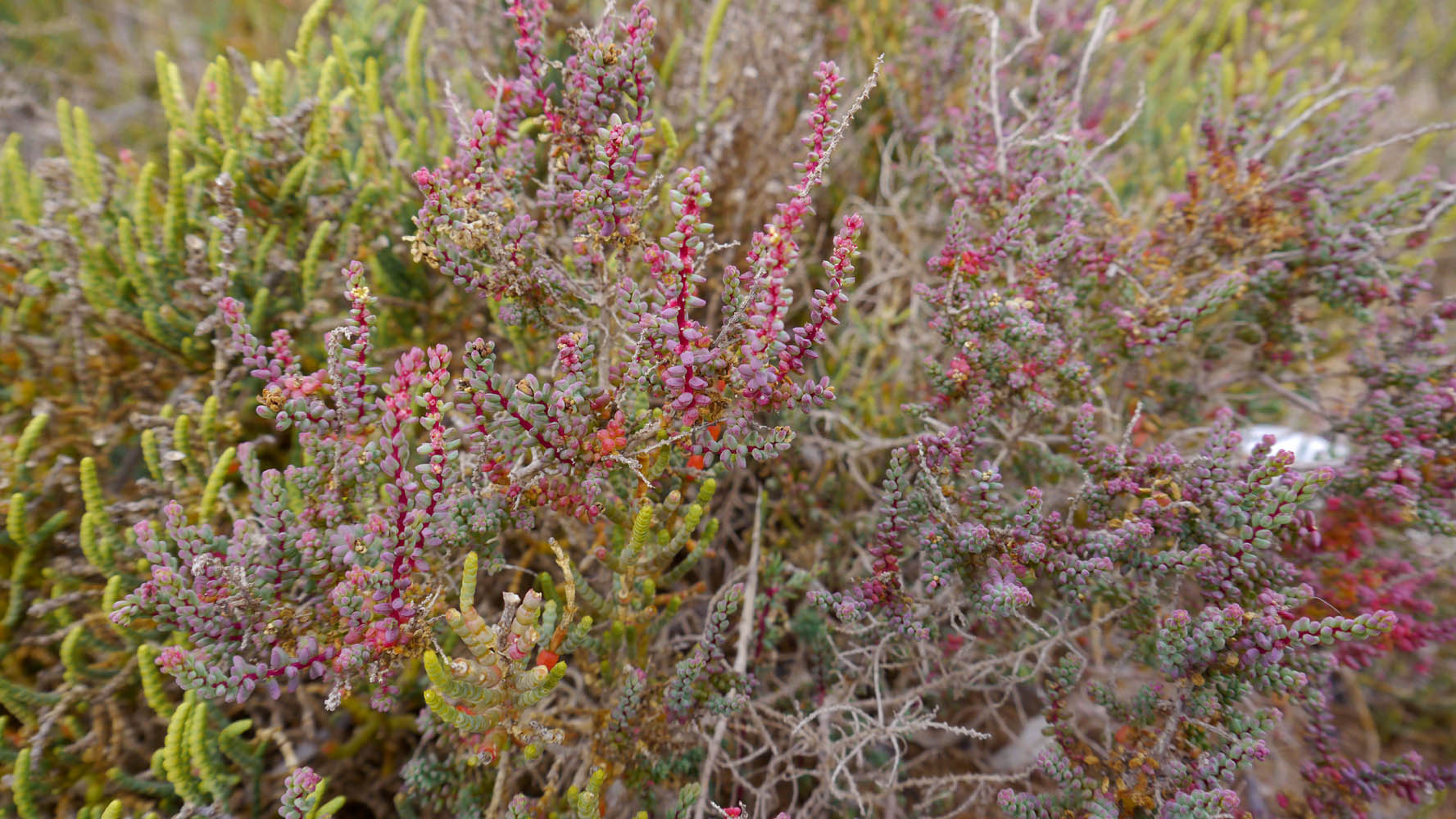 Suaeda vera en las salinas de Marchamalo (Cartagena, España).